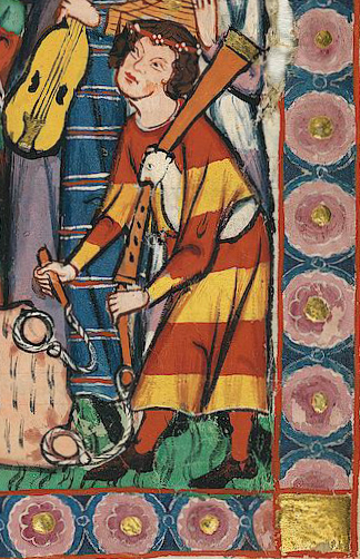 Sackpfeier (Dudelsackspieler) aus dem Codex Manesse 399r